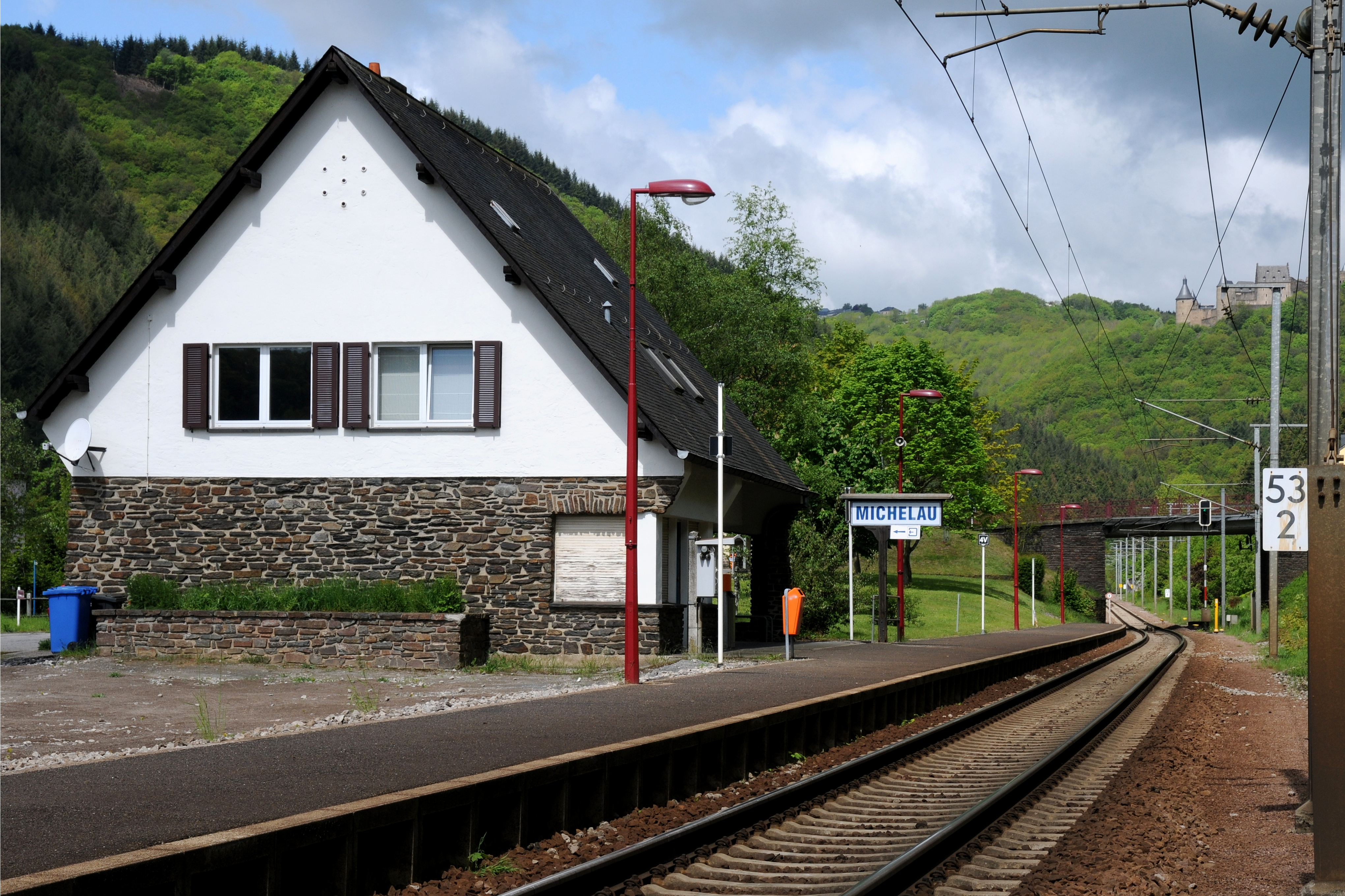 D'Gare zu Méchela.